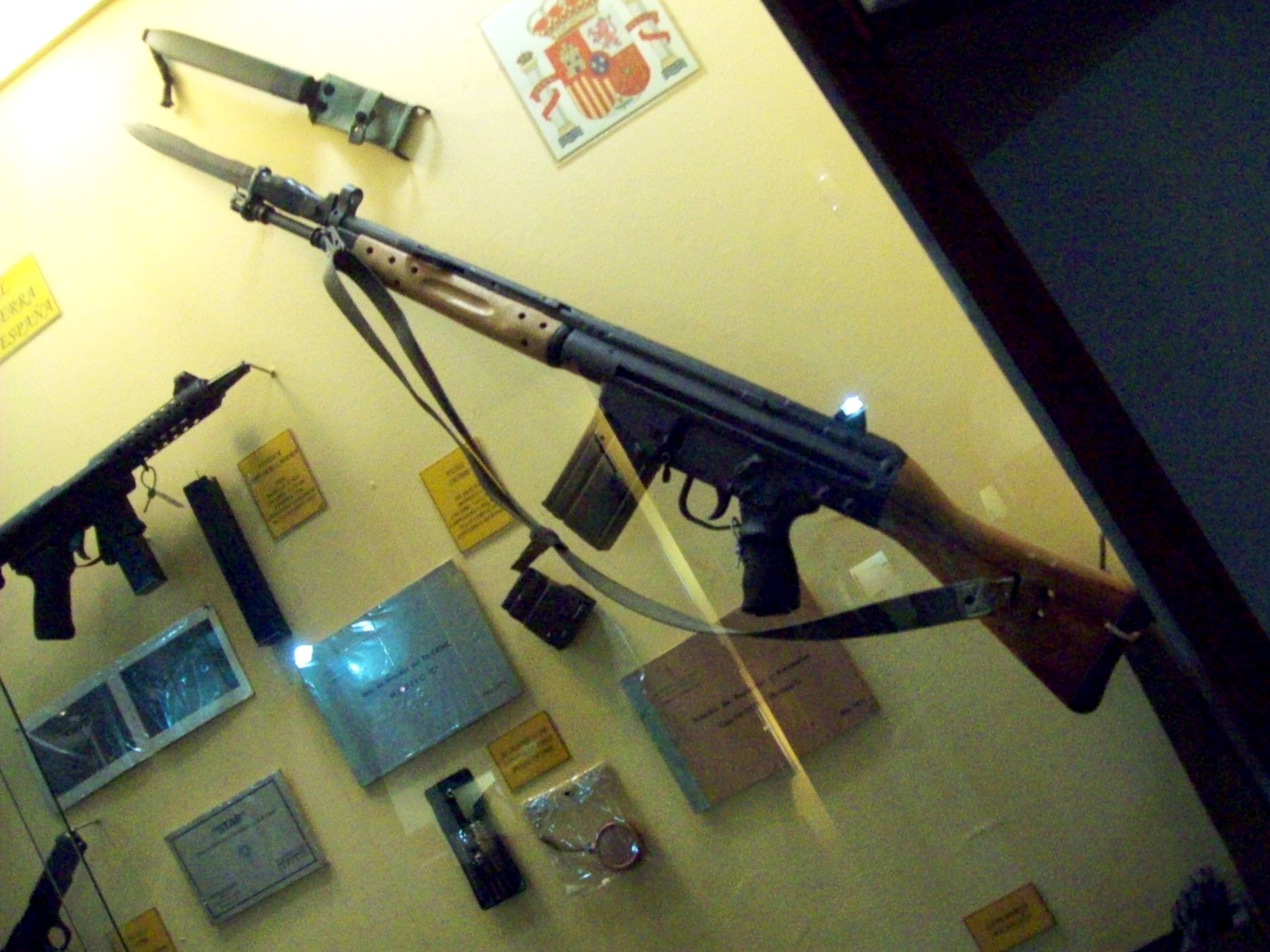 Armamento expuesto en el Museo de Armas de la Nación, ciudad de Buenos Aires, Argentina 2014.